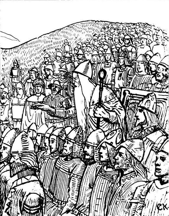 Christian Krohg: Illustration for Olav den helliges saga, Heimskringla 1899-edition. nn: «Torgny lagmann på Uppsalating.»